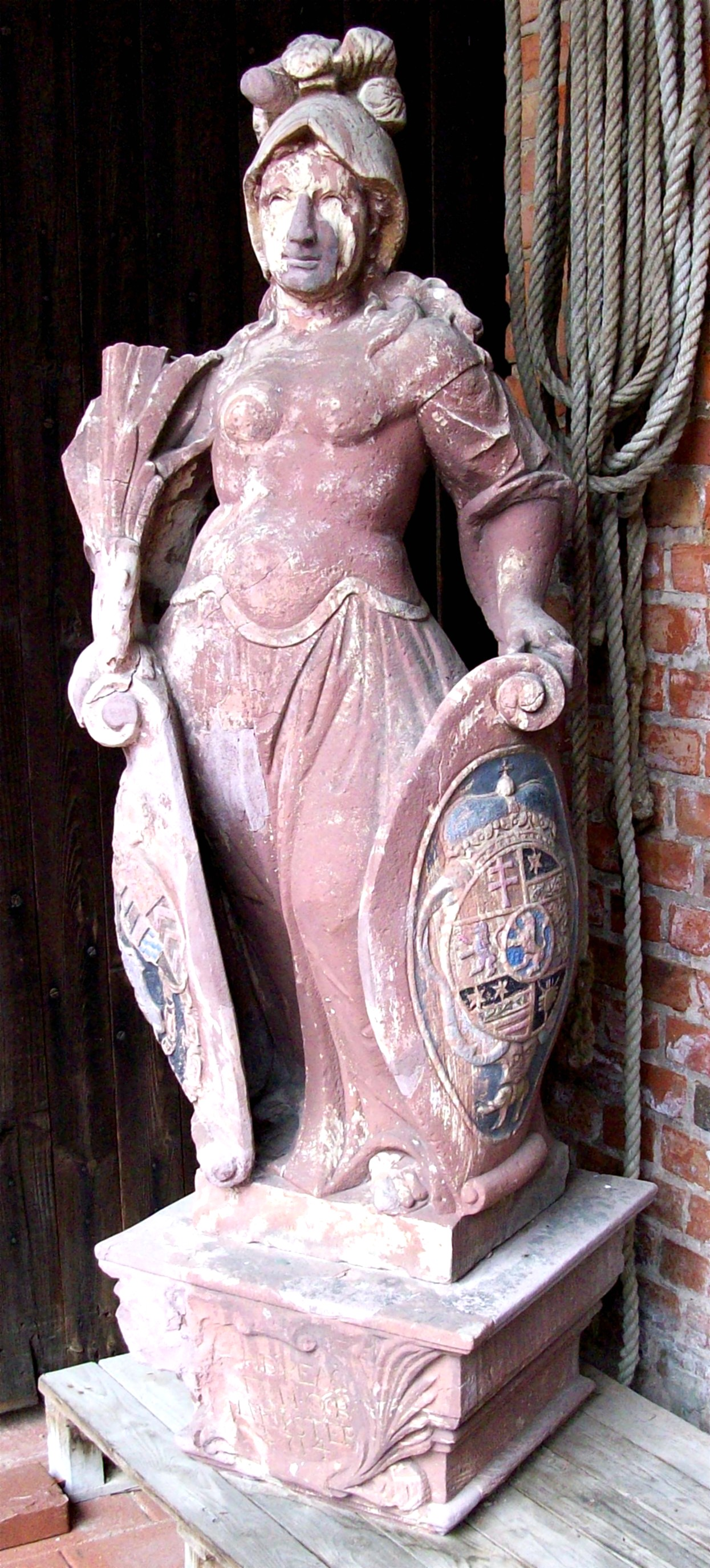 Die originale Bietjungfer vom Brunnen vor dem Marktplatz der Stadt Groß-Umstadt: heute noch im Museum Gruberhof (Original des Original, verm. Mitte 19. Jahrhundert)